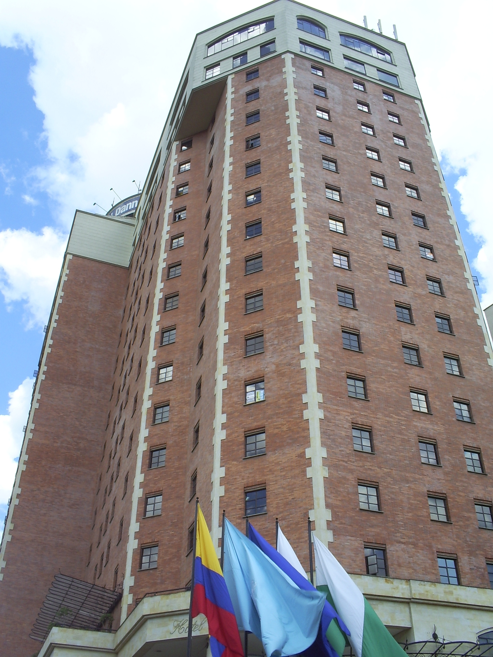 Hotel Dann Carlton, Avenida Poblado, Medellín, Colombia